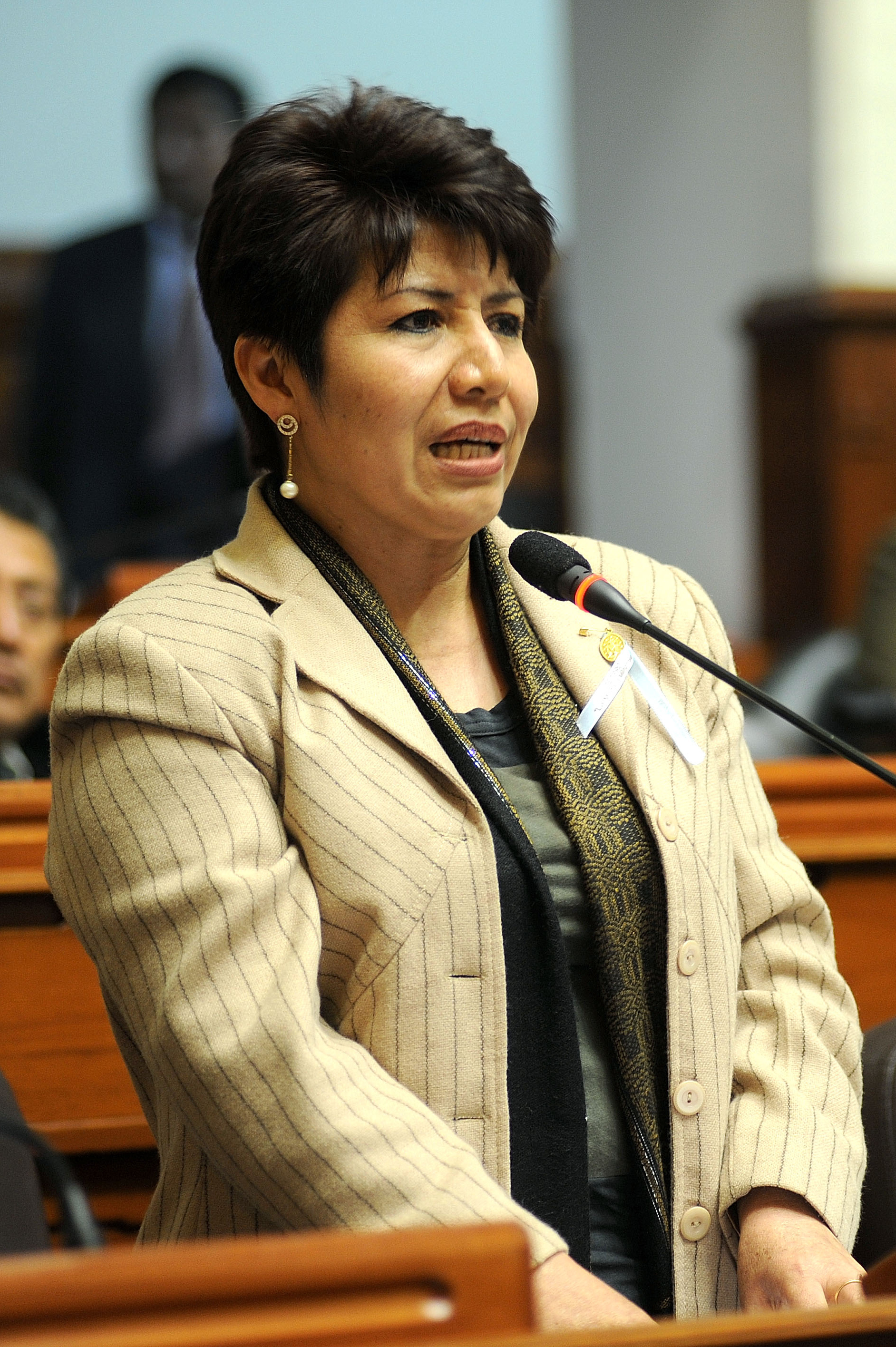 La legisladora Hilda Guevara Gómez expresa su posición en el debate parlamentario realizado esta tarde por el Pleno congresal.